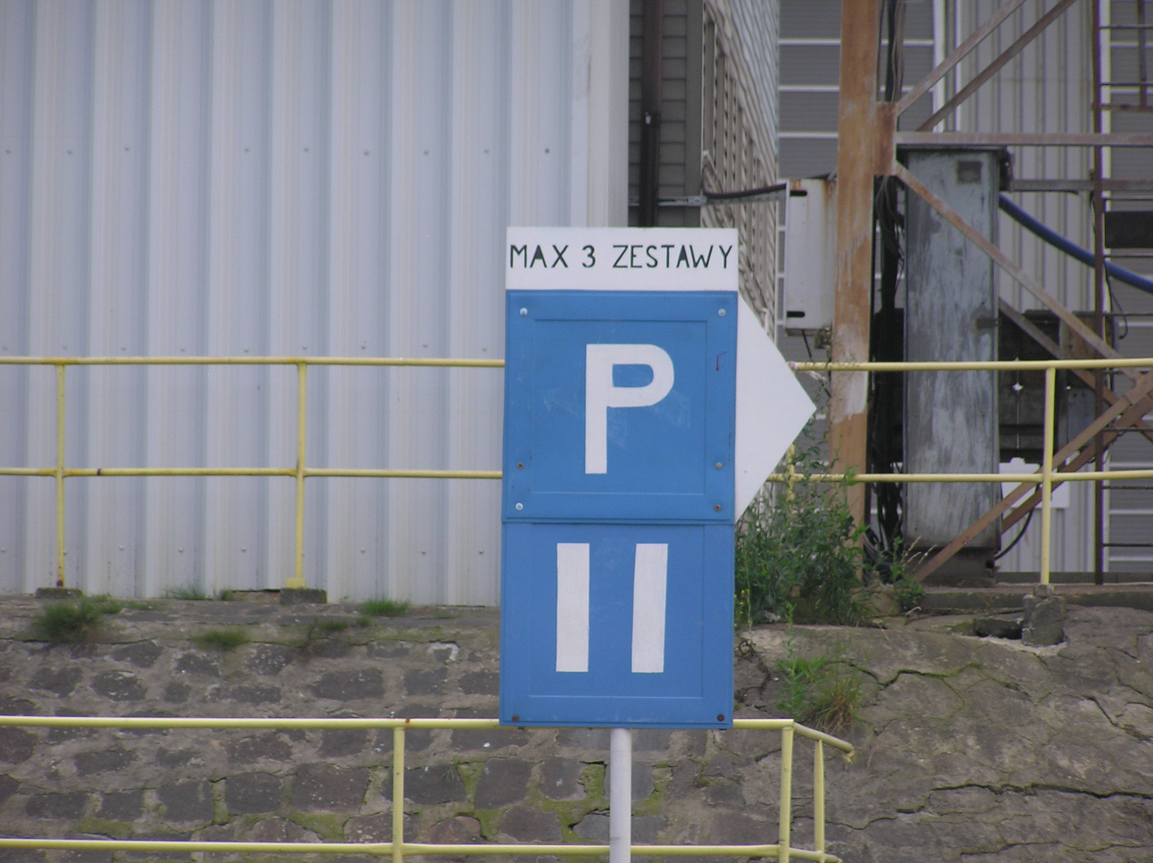 Wrocław, Kleczków, Odra - Kanał Miejski/Stara Odra, Przeładownia Elektrociepłowni Wrocław